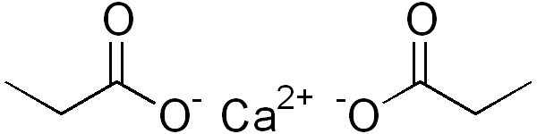 chemical structure of calcium propanoate (calcium propionate)